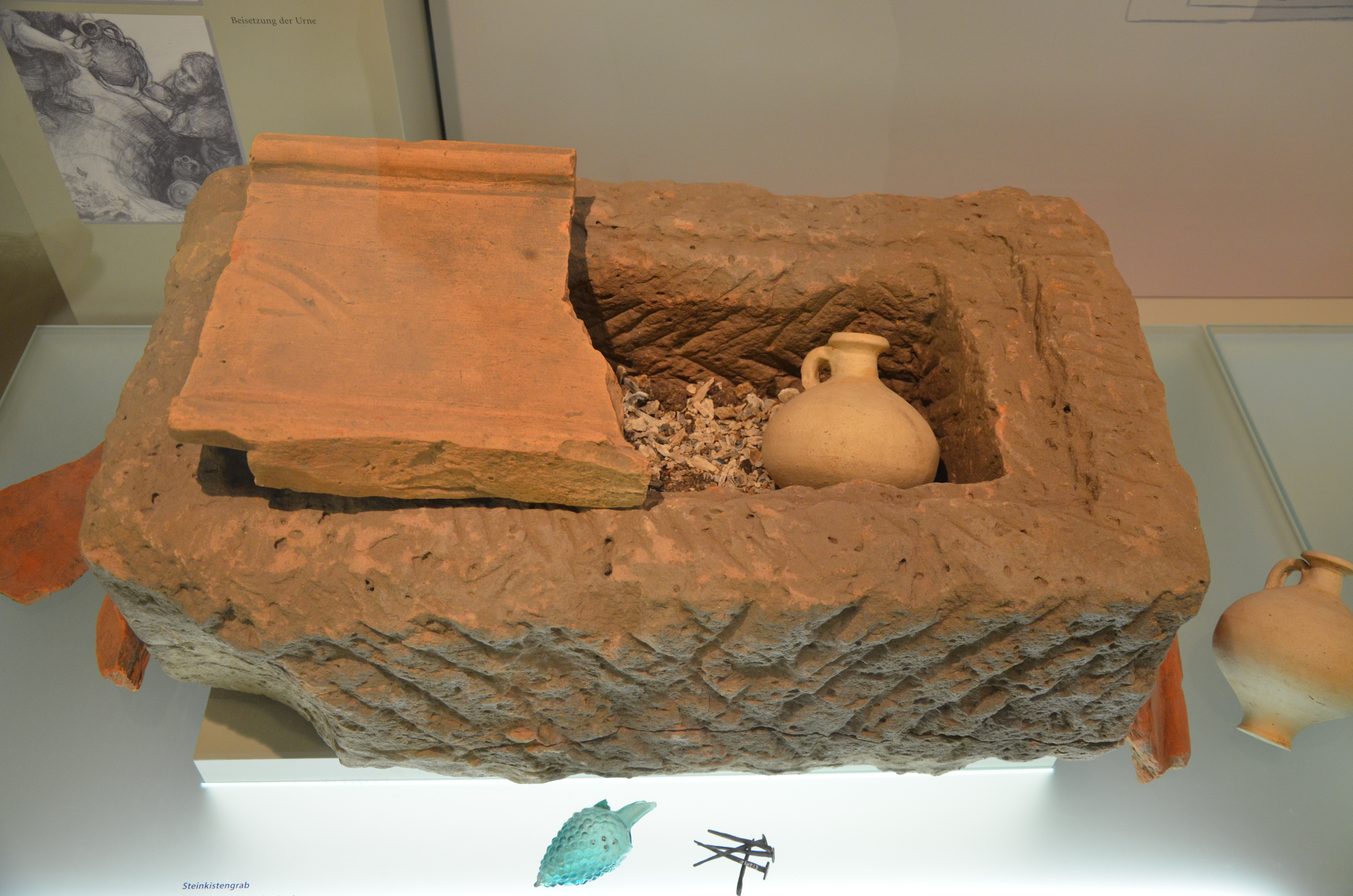 Museum Schloss Fechenbach, Dieburg, Germany